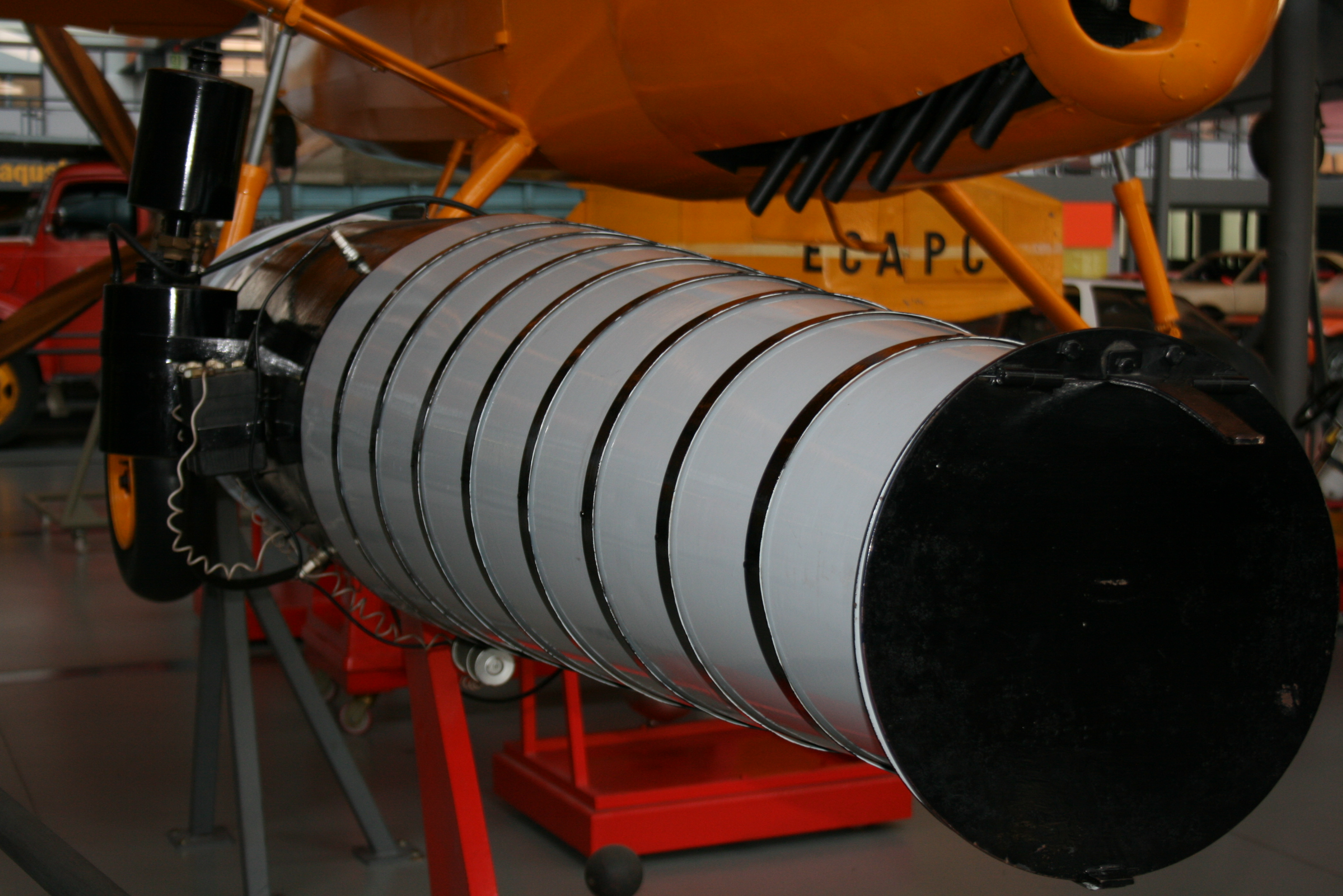 Maqueta del pulsorreactor de Ramón Casanova construit en 1917, exposada en el Museu de la Ciencia i la Tècnololgia de Terrassa